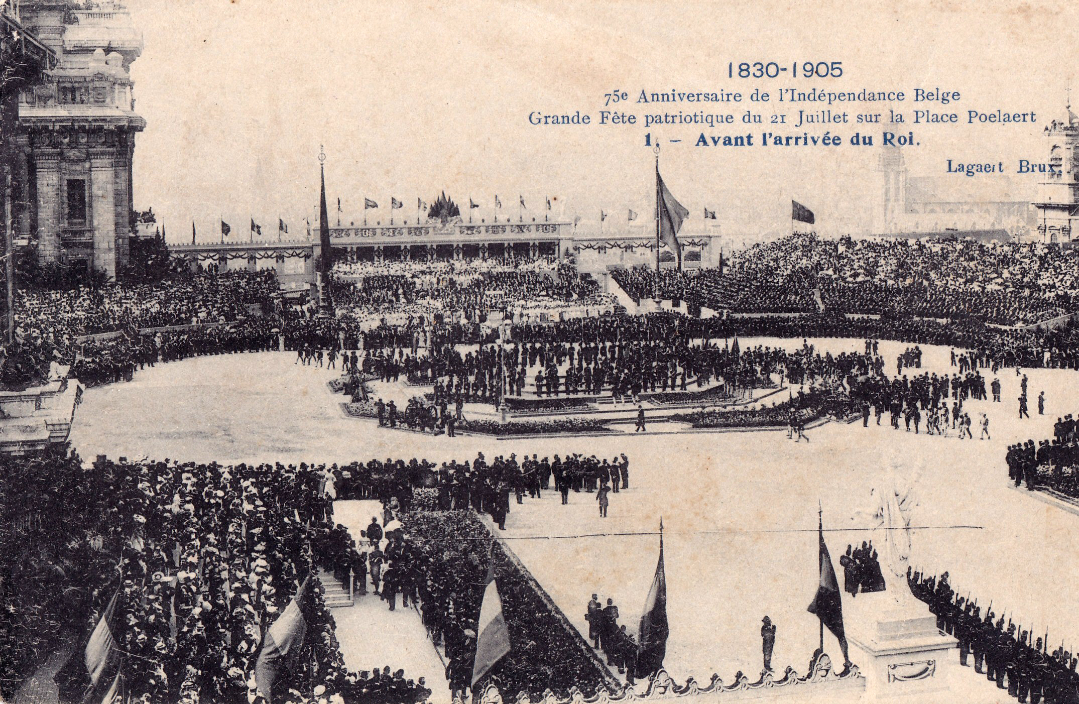 1830 1905, 75º aniversário da independência belga, Arquivo de Villa Maria, Angra do Heroísmo, Açores.